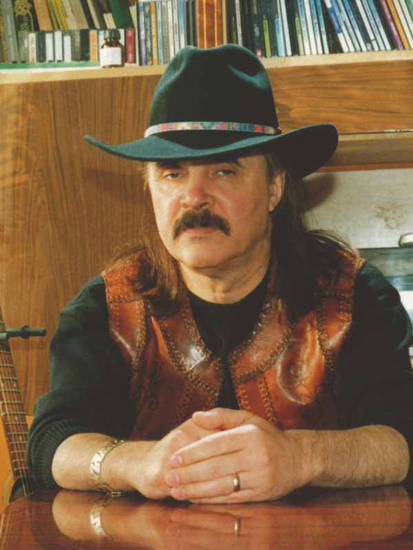 Maestro Iurie Sadovnic-Orheianul.